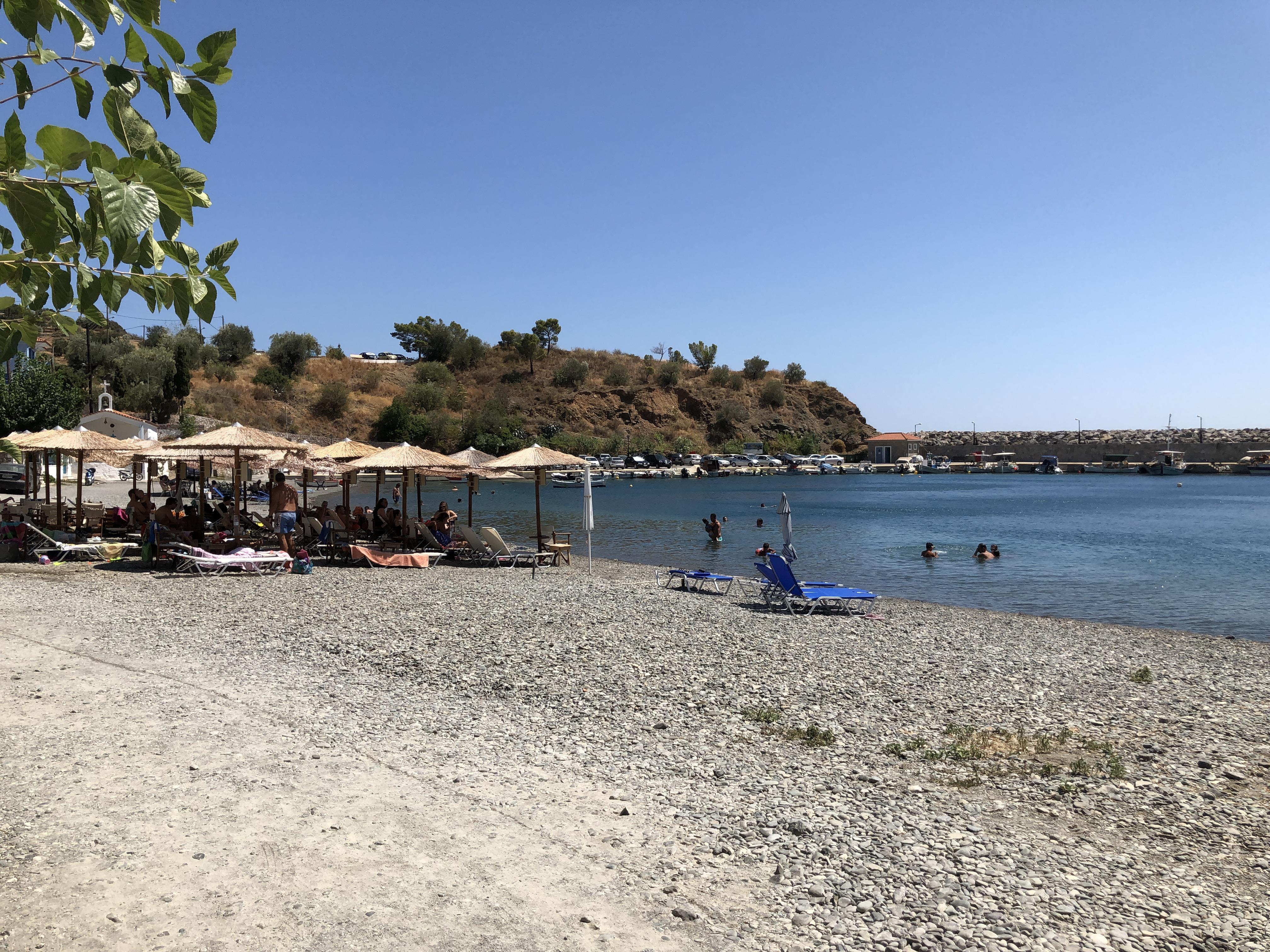 Port et plage de Sampatiki. Côte orientale du Péloponnèse (Grèce).